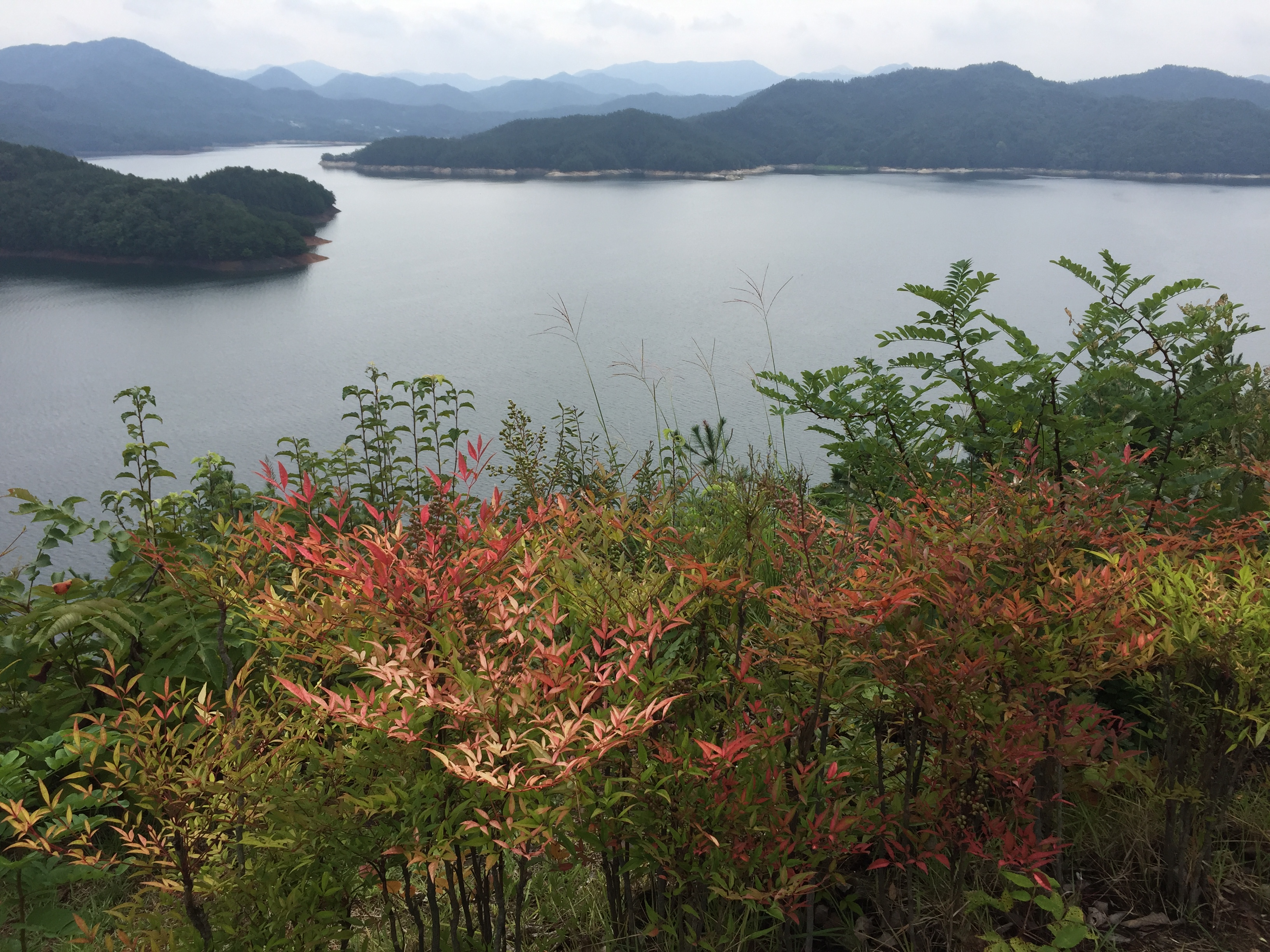 대청호오백리길 3구간_6